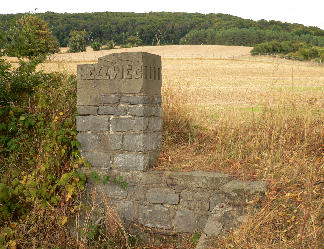 Stein bei Latferde an der Straße über den Bückeberg zum Gelände der Reichserntedankfeste